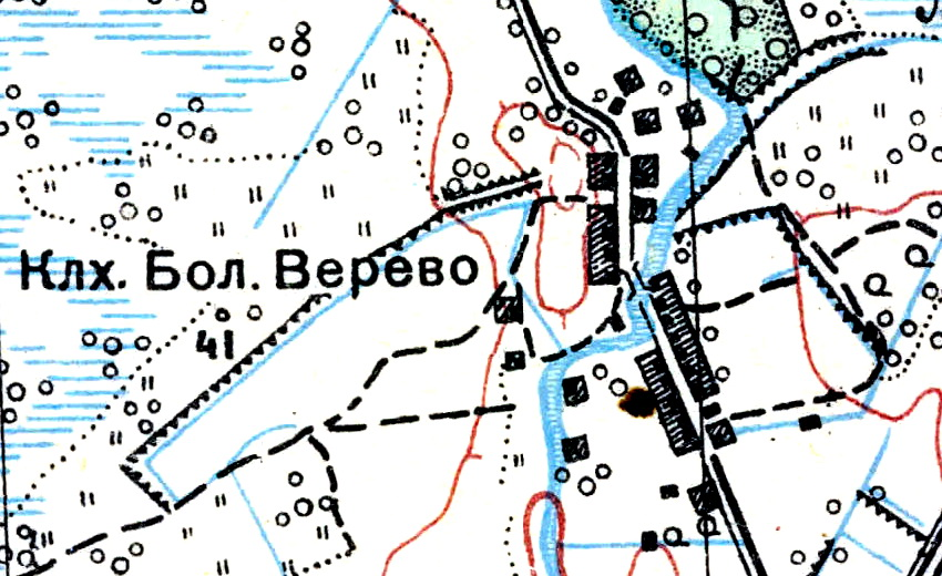 Топографическая карта Ленинградской области, квадрат О-36-13-А-б (Пос. Тайцы), деревня Большое Верево